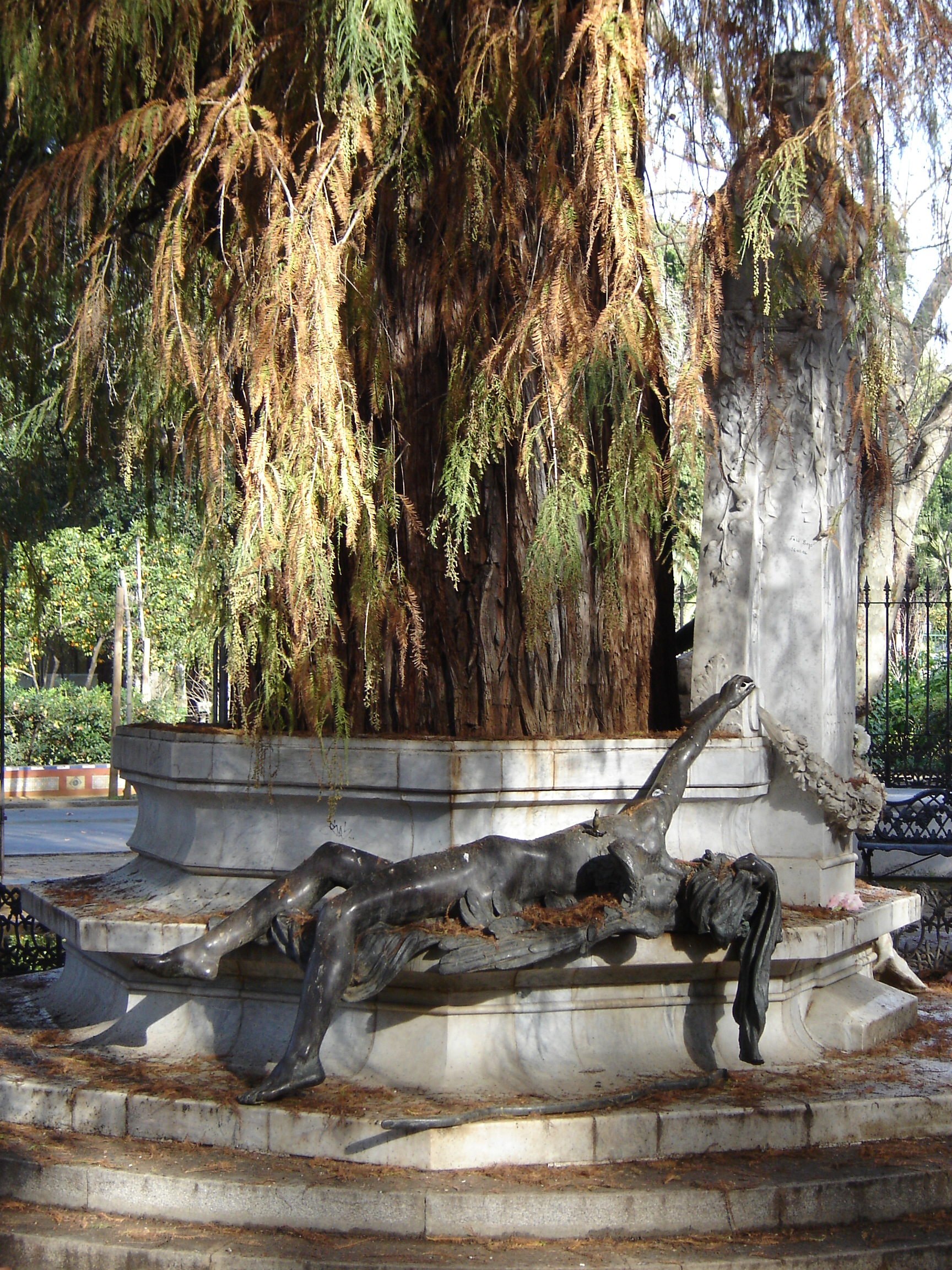 Glorieta de Bécquer, en el Parque de María Luisa (Sevilla). Imagen alegórica representando a "el amor herido". Realización propia.